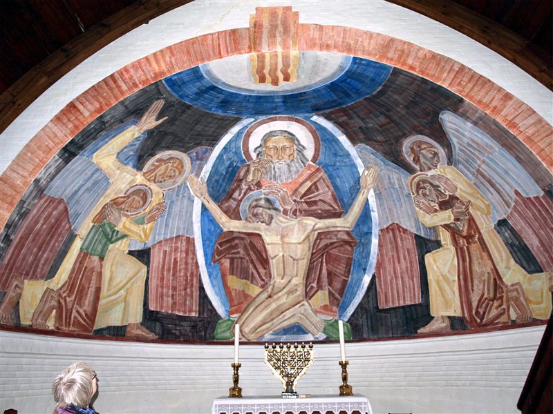 Gedser Kirke i Danmark. Apsisudsmykning Apsis decorations by Elof Risebye (1924)